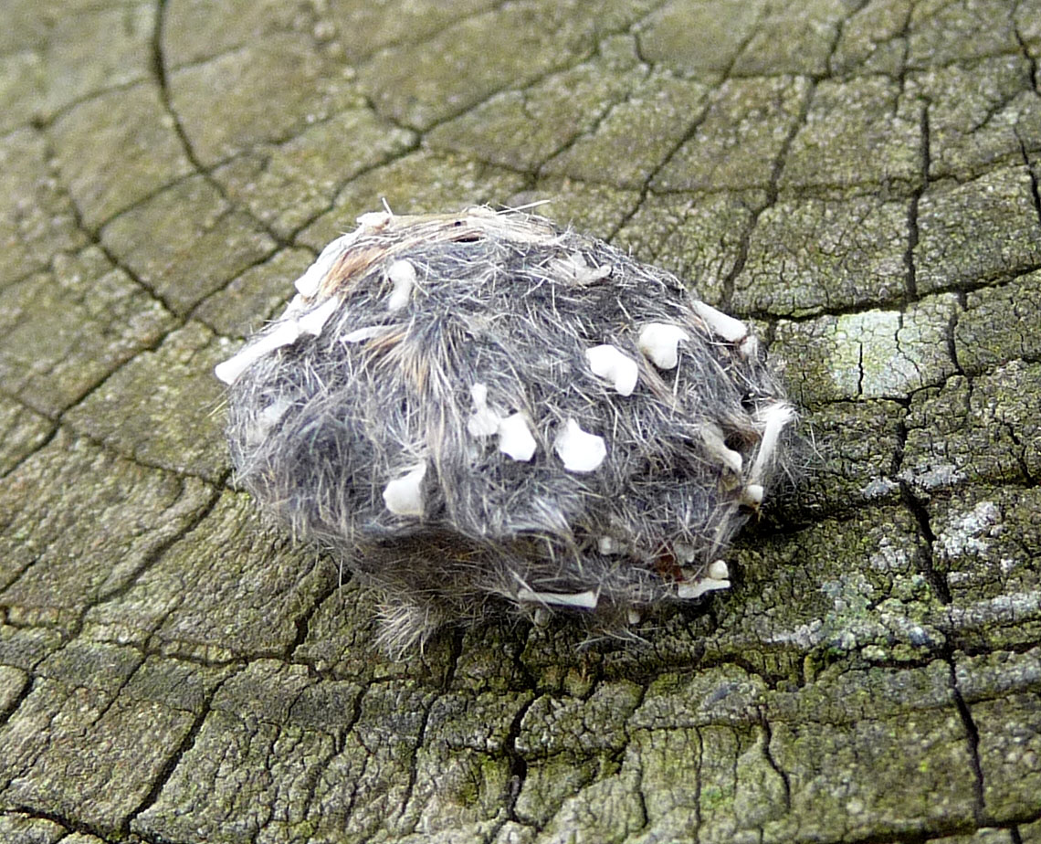 Owl Pellet